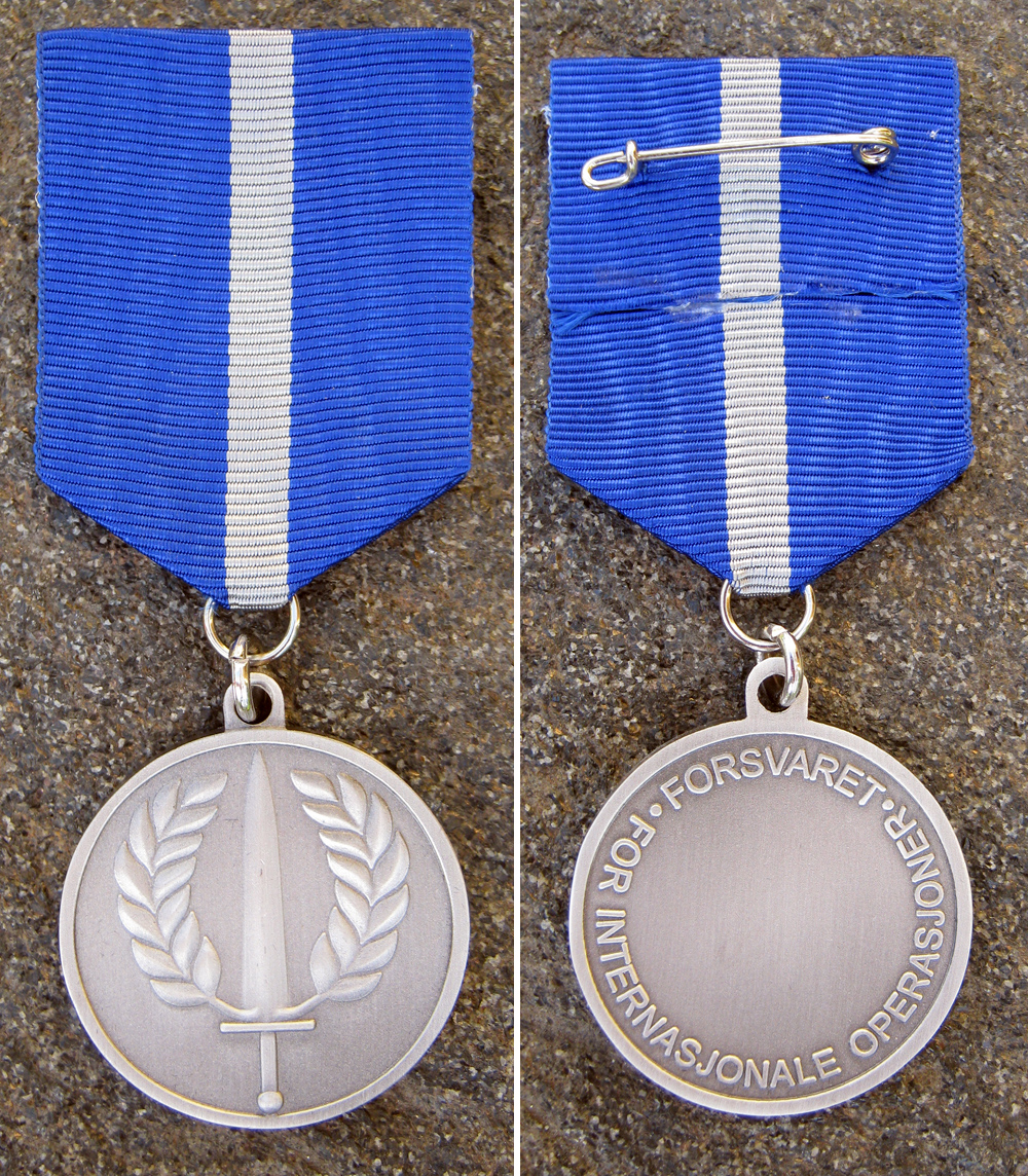 Norsk (bokmål): Forsvarets medalje for internasjonale operasjoner, advers og revers